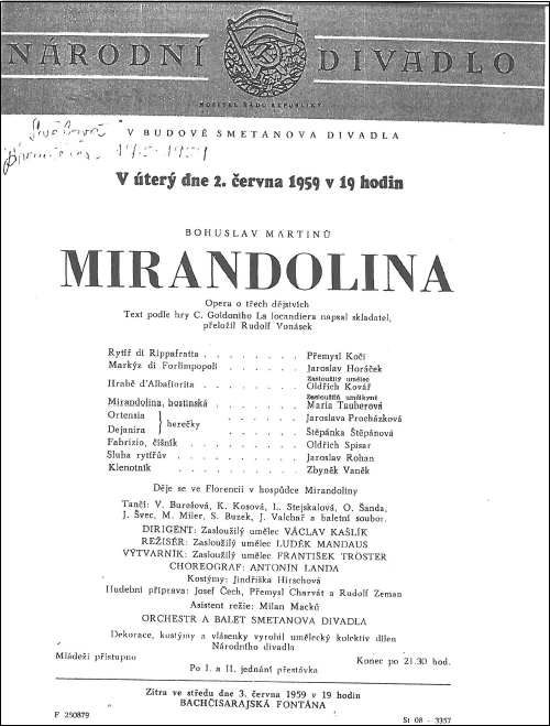 Bohuslav Martinů Mirandolina 2. Juni 1959 Smetanovo divadlo